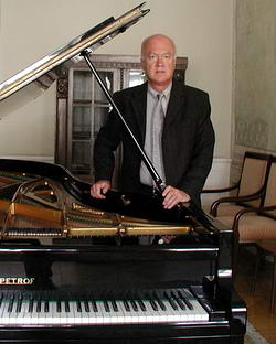 Boris Krajný, klavírista a pedagog.